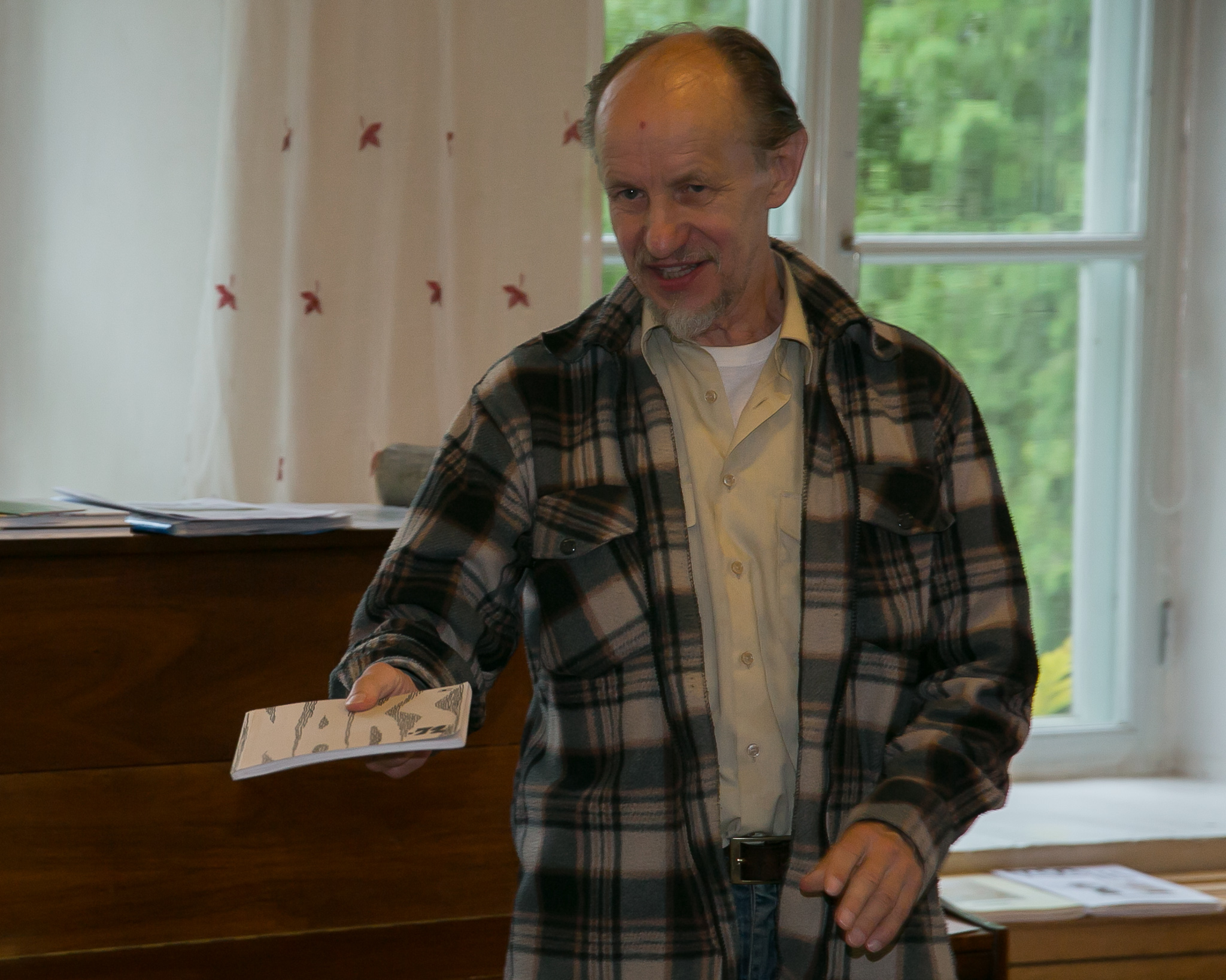 Karikaturist ja huumorikoguja Viljar Ansko Eesti Huumoriliidu suveüritusel Purkus (Raikküla vald, Raplamaa) tutvustamas kunagise karikaturistide ühenduse NAKS ajalugu ja tegemisi.